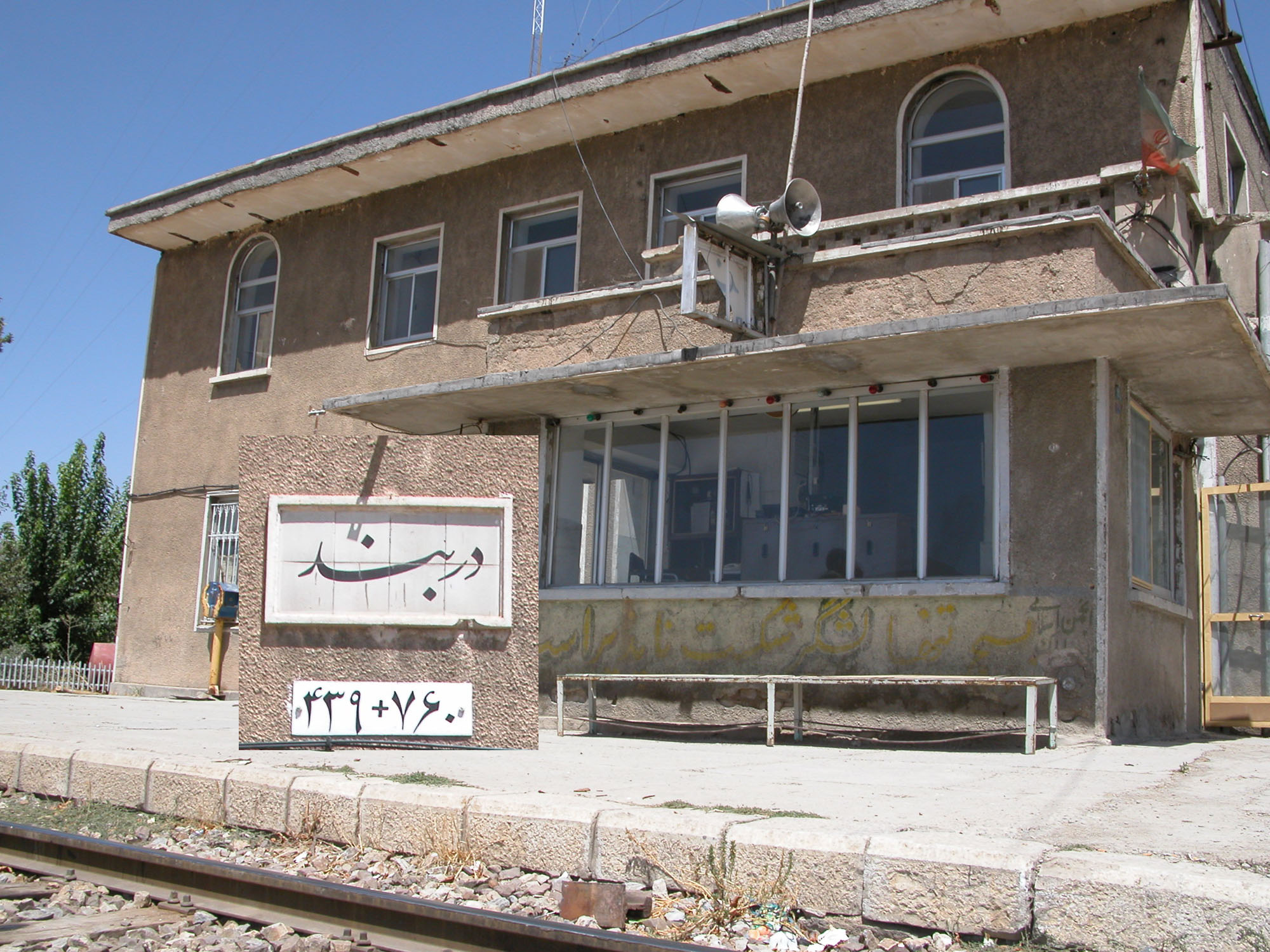 Darband.